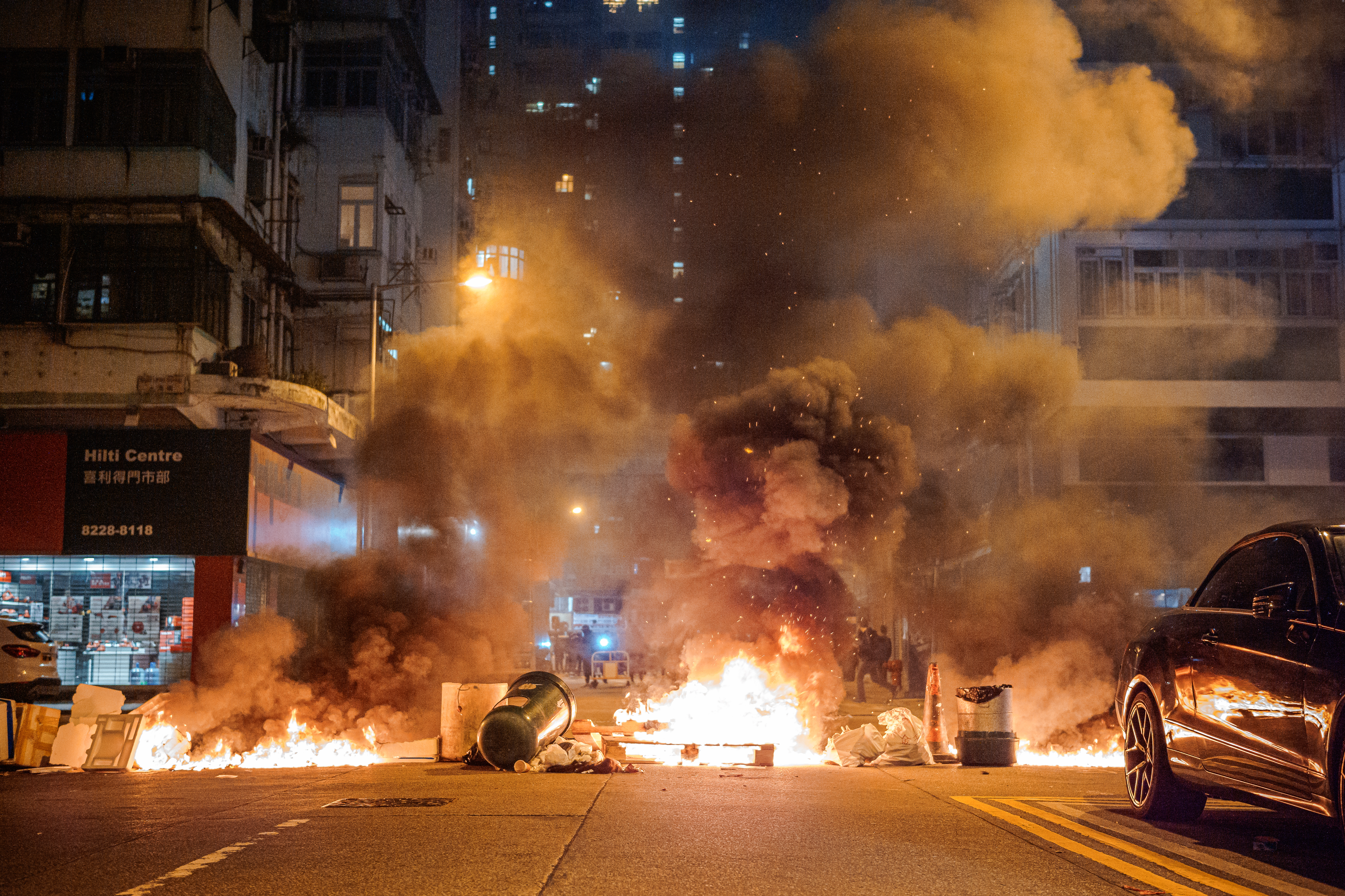 SDIM0418